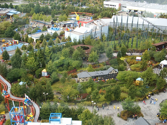 View of Legoland Deutschland in Bayern